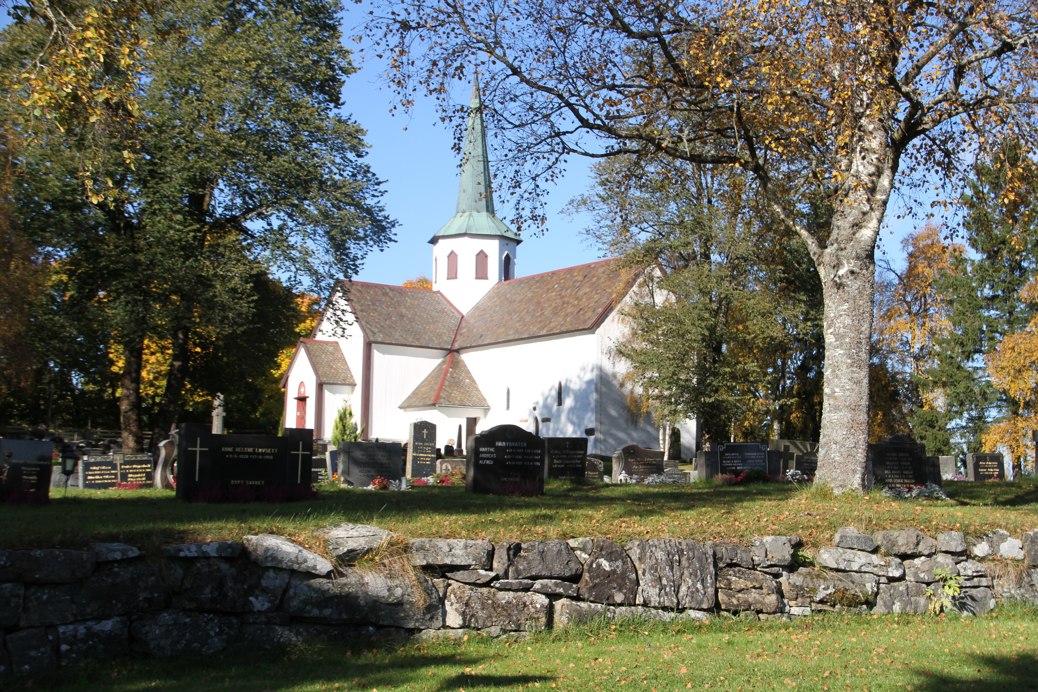 Church in the municipality of Lunner, at Hadeland (Oppland county, Norway).